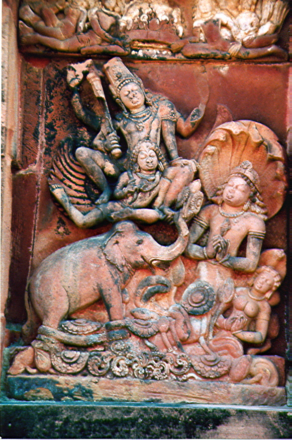 Gajendra Moksha - Vishnu saving the elephant: Rathika Panel Dasavatara Temple Deogarh India